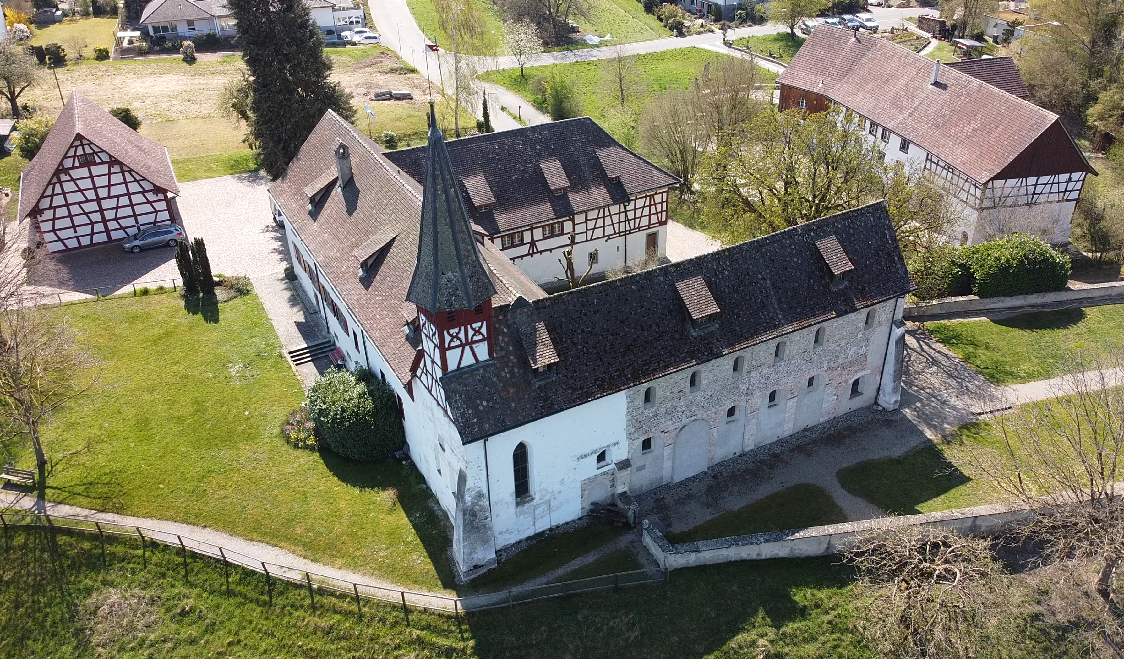 Propstei Wagenhausen von Oben gesehen